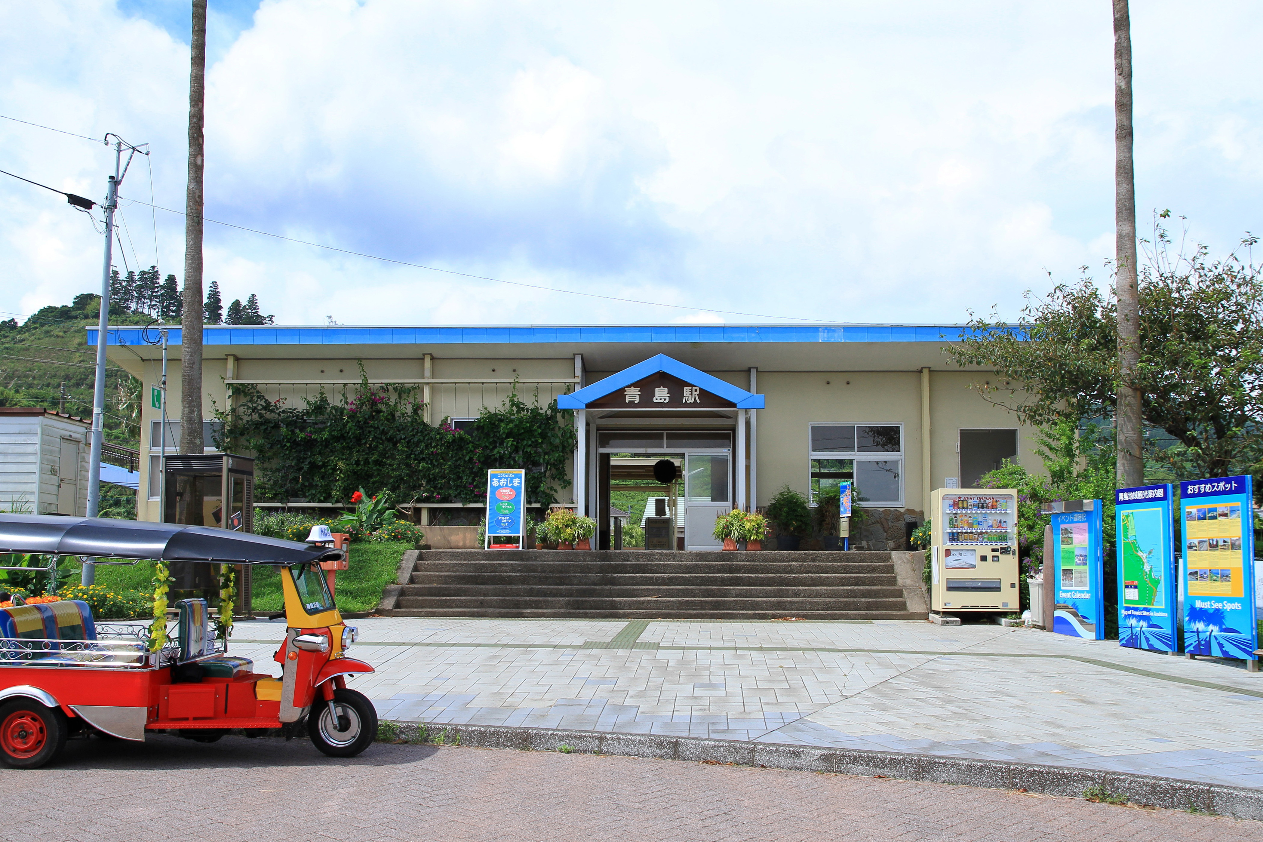 青島駅 駅舎（宮崎県宮崎市）